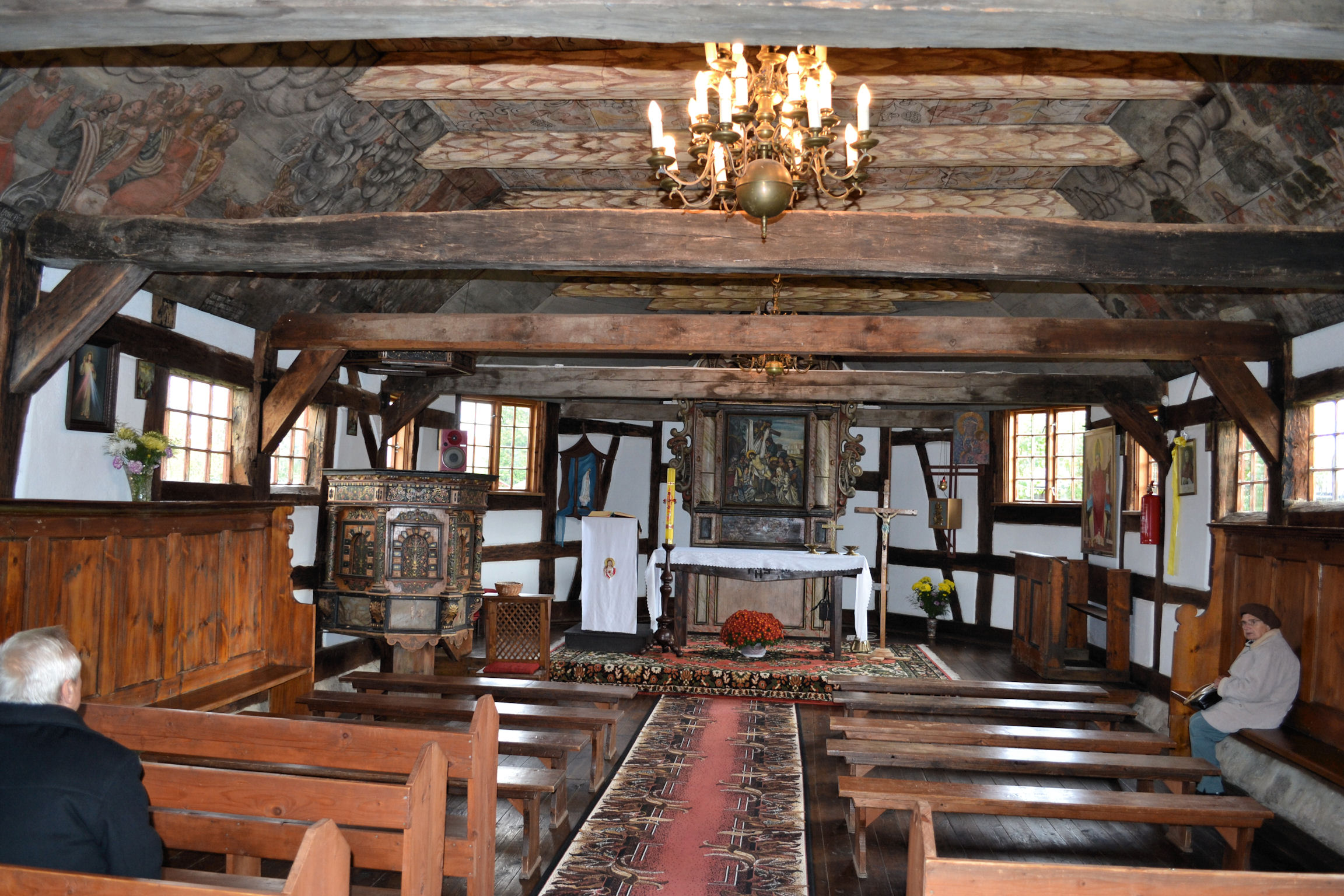 Kościół w Dzisnej (województwo zachodniopomorskie)